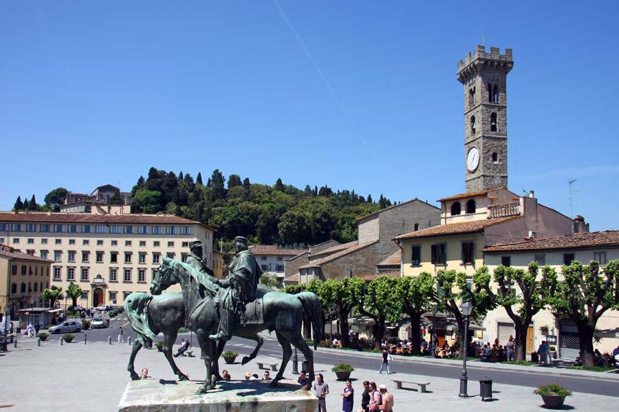 Veduta di Piazza Mino a Fiesole (FI)